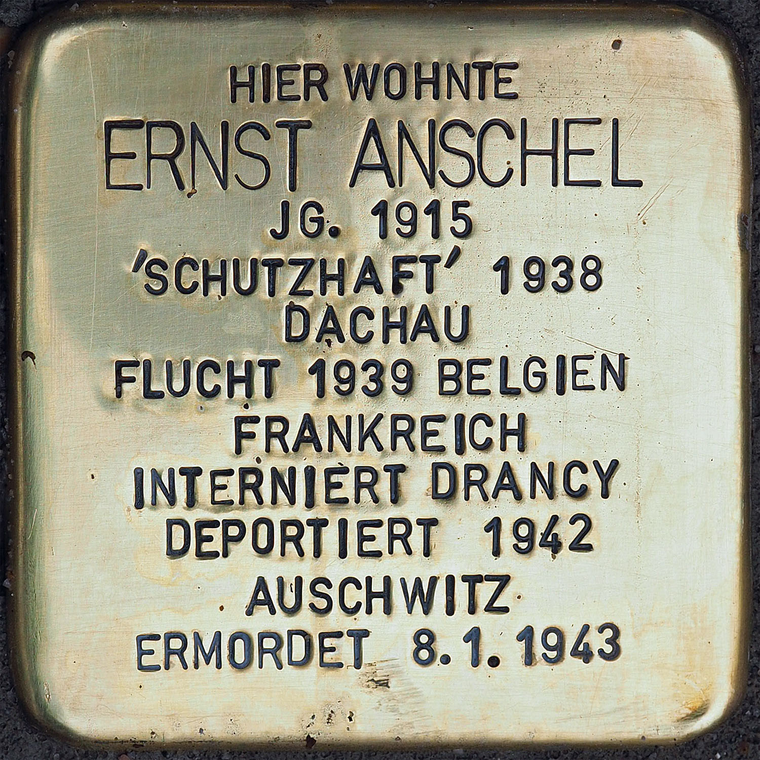 Stolpersteine in Kempen: Anschel, Ernst